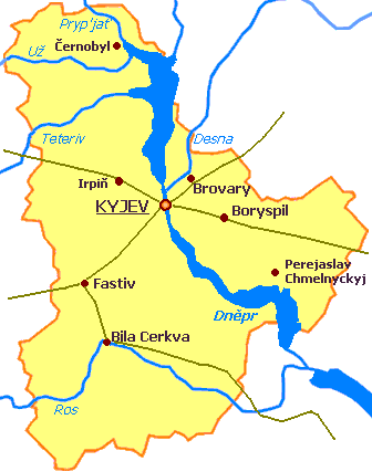 railroad line, Kyiv Oblast